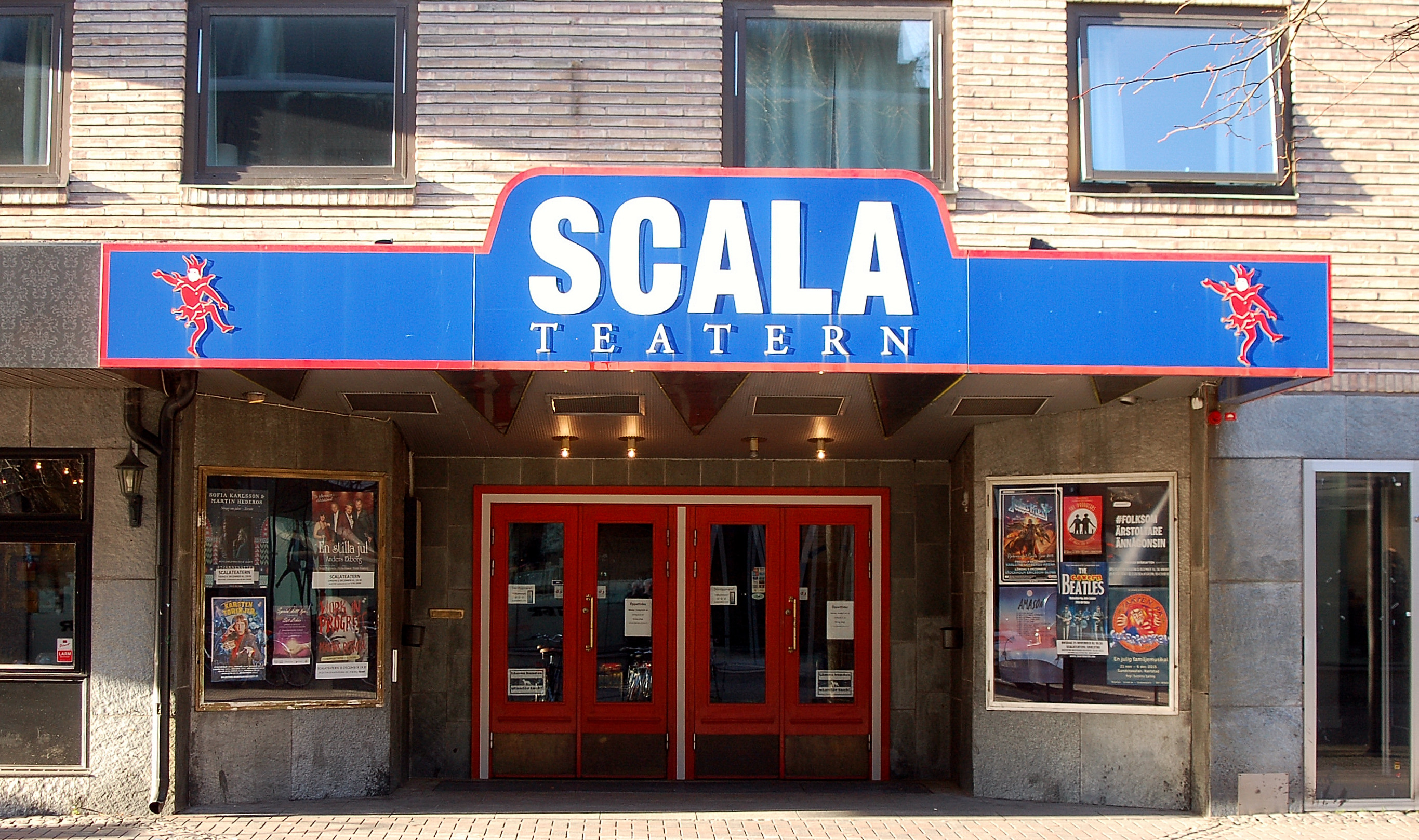 Scalateatern i Karlstad.